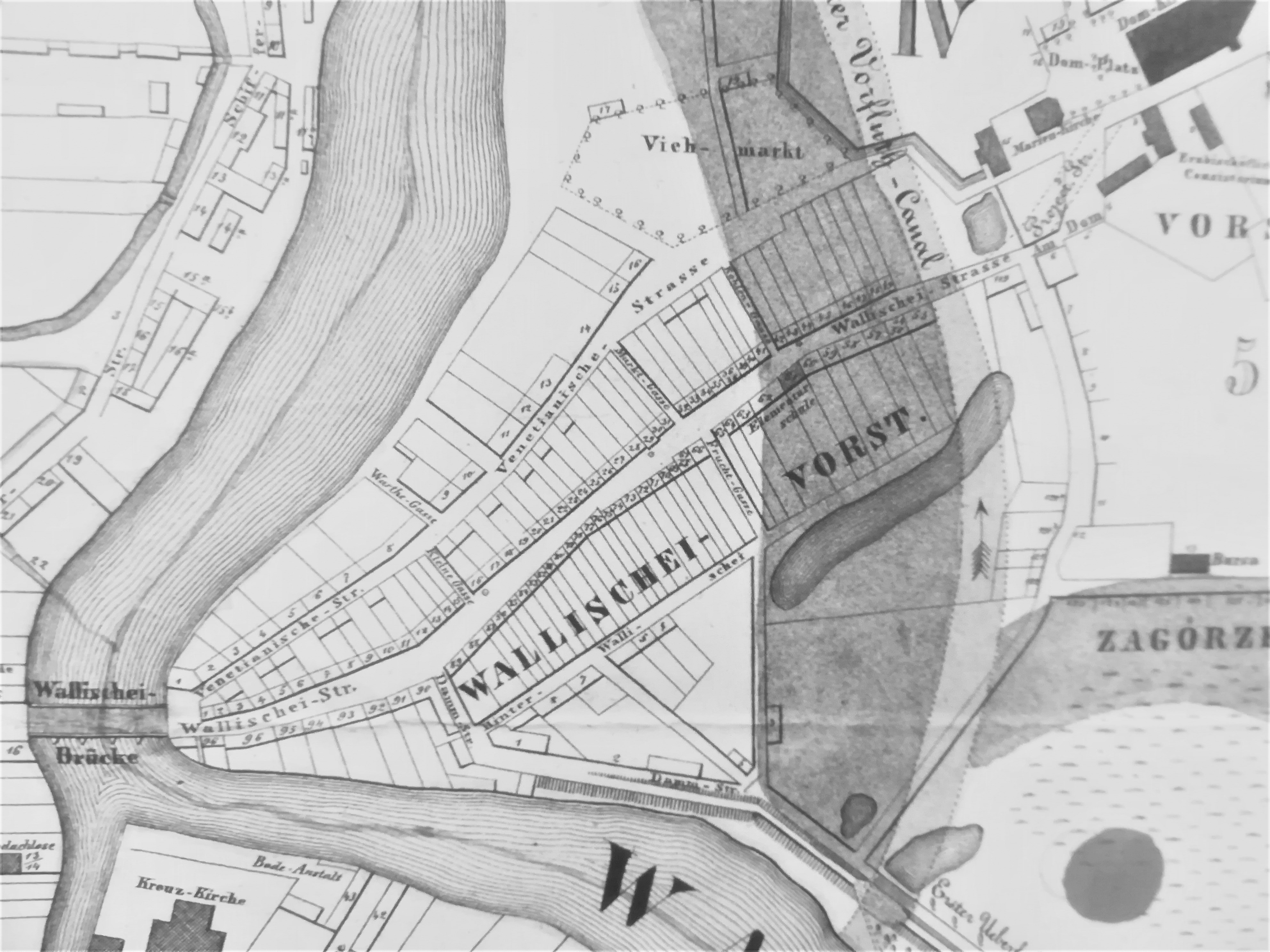 Mapa Corvinusa z 1856 r. - Chawliszewo, Poznań.